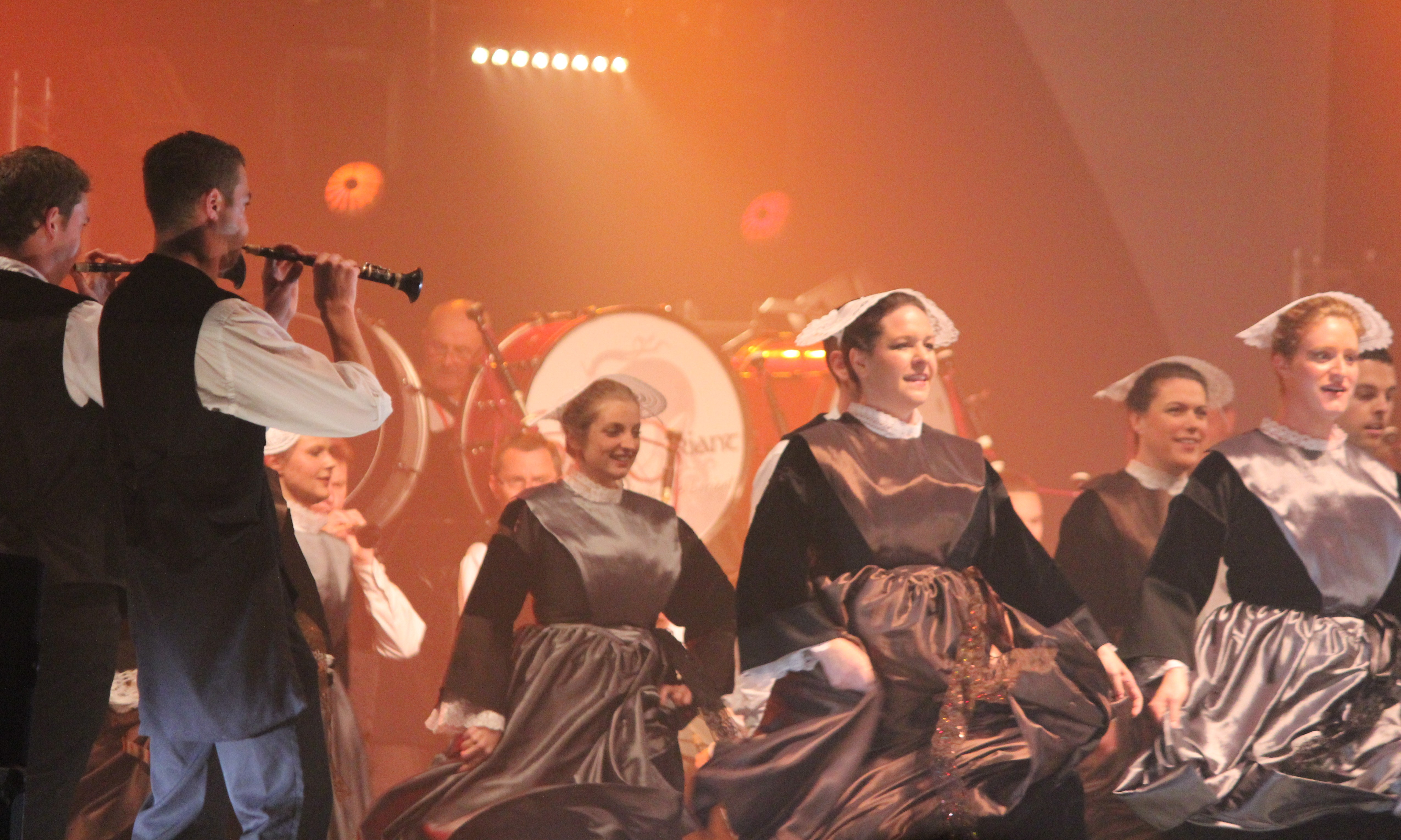 armor argoat au FIL 2011